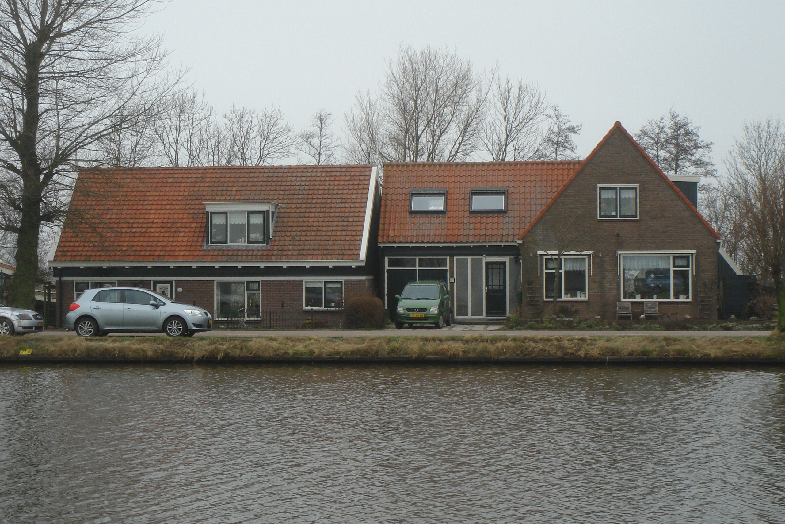 Kanaaldijk 49 en 47 in West-Graftdijk, de twee huizen aan het Noord-Hollands kanaal die in de film zijn gebruikt. Links het huis van de buurvrouw, rechts dat van Valerie Jaspers. Foto: Daniel van der Ree (1 maart 2012)